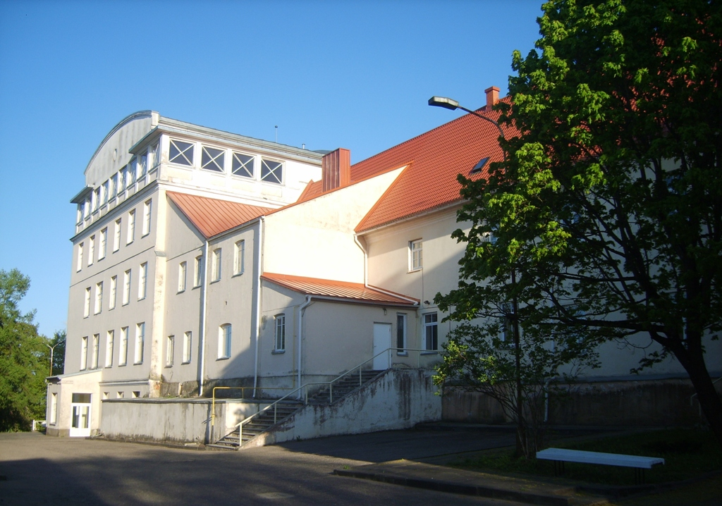 Telšių Vyskupo Vincento Borisevičiaus kunigų seminarija